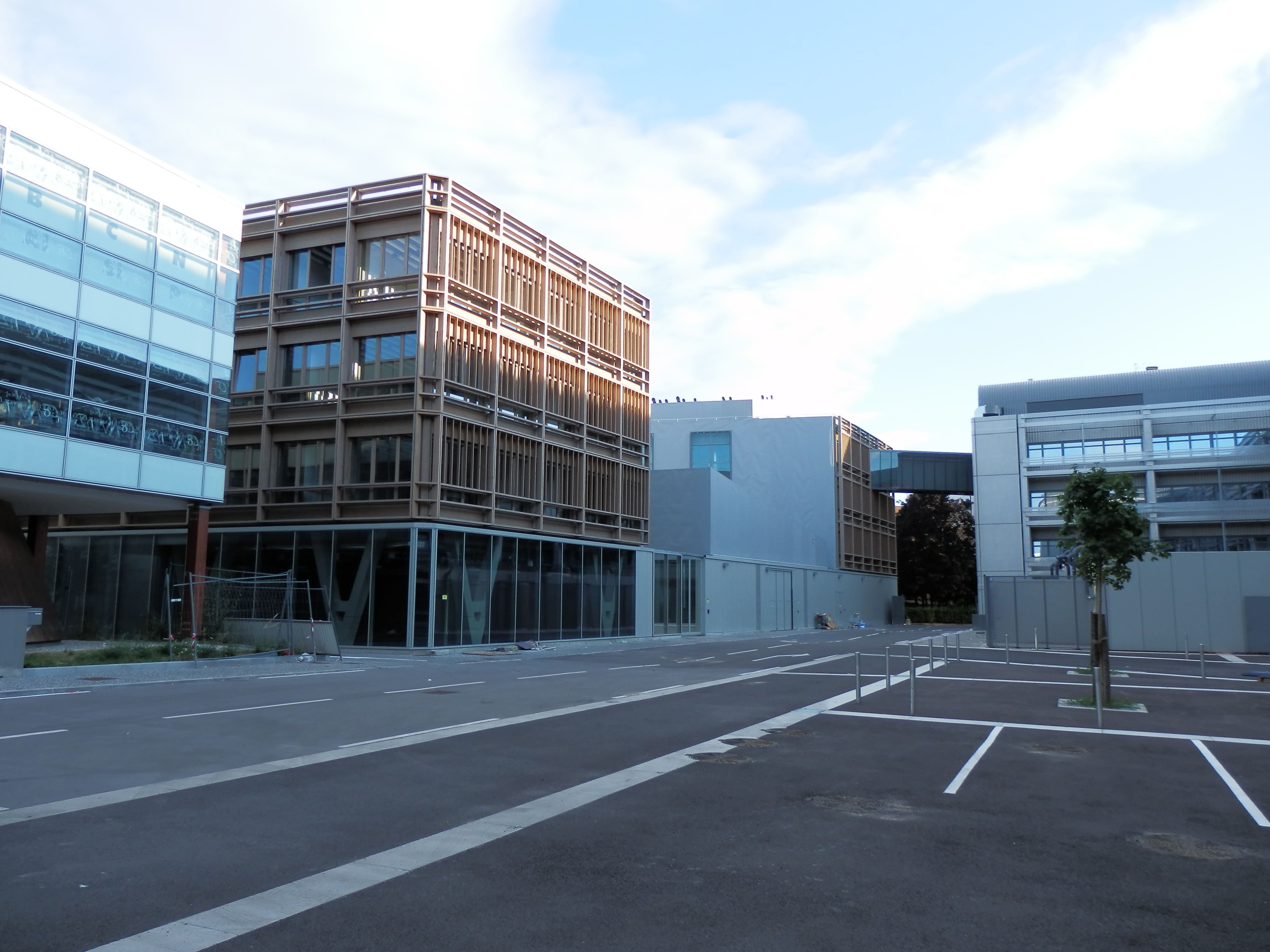 Regroupement de Centres et d’Instituts (CRMN, ISA, CLYM, CEMAGREF) au sein de la Cité Lyonnaise de l’Environnement et de l’Analyse (CLEA). Sur la gauche, les étapes ﬁnales de la construction du bâtiment CEMAGREF.